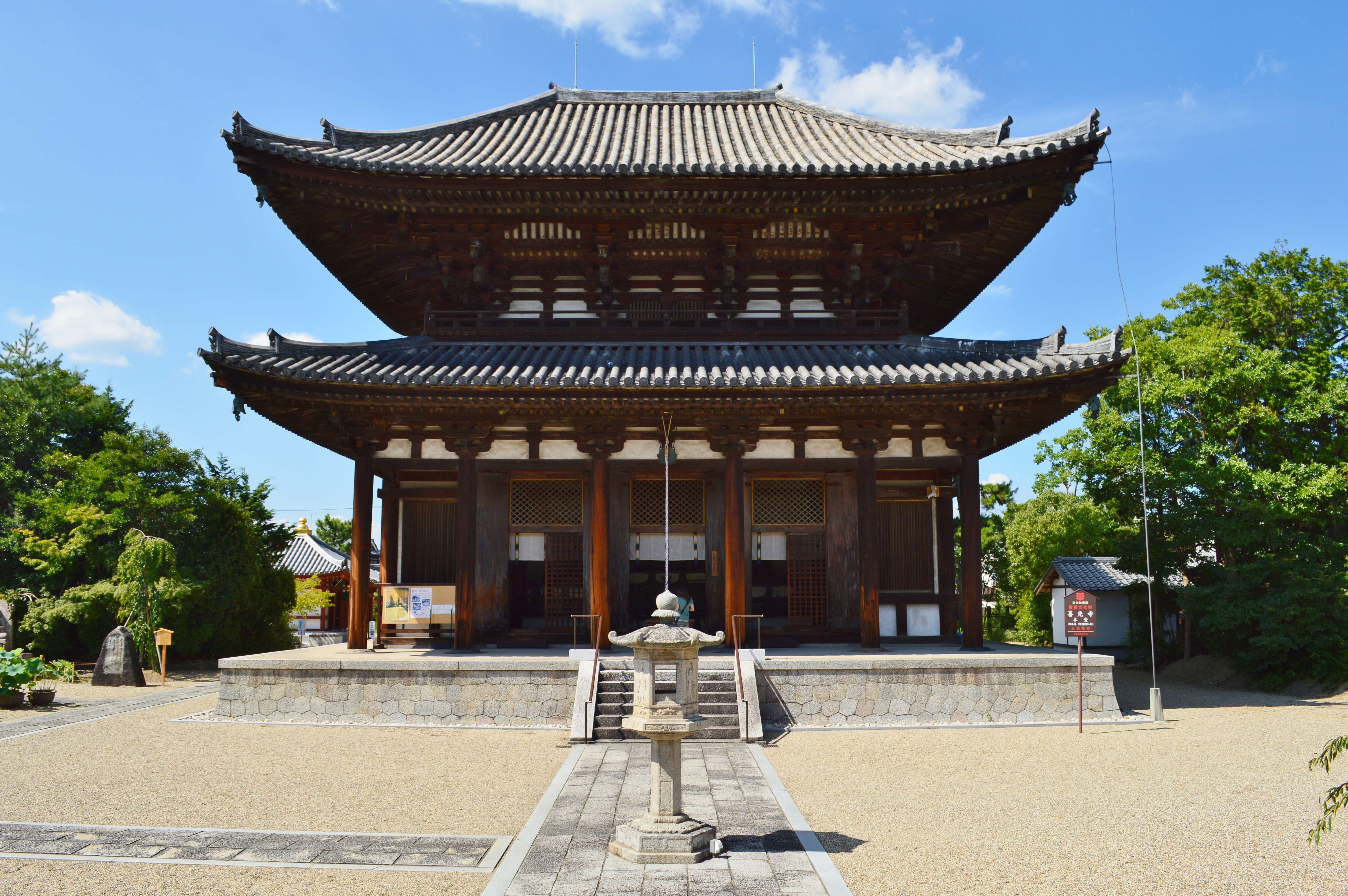 喜光寺 (奈良市) 本堂